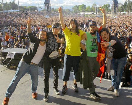 Doctor Krapula en rock al parque 2011